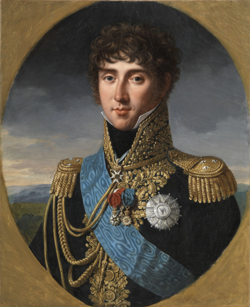 En uniforme de général de division de la Garde impériale